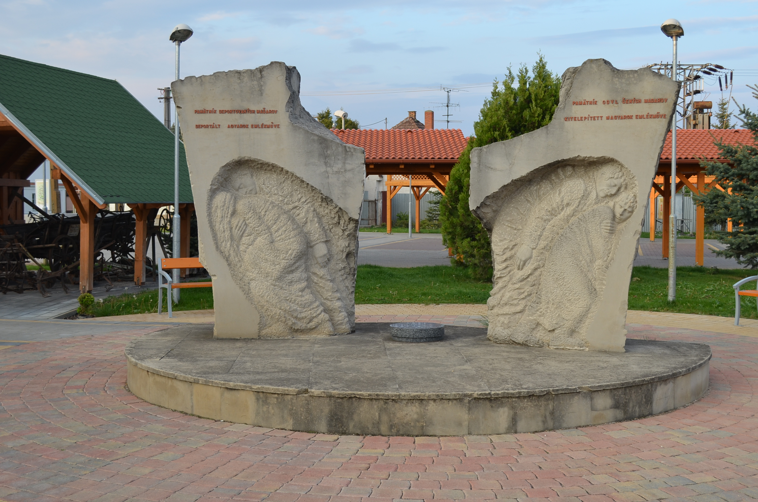 Nagymácséd